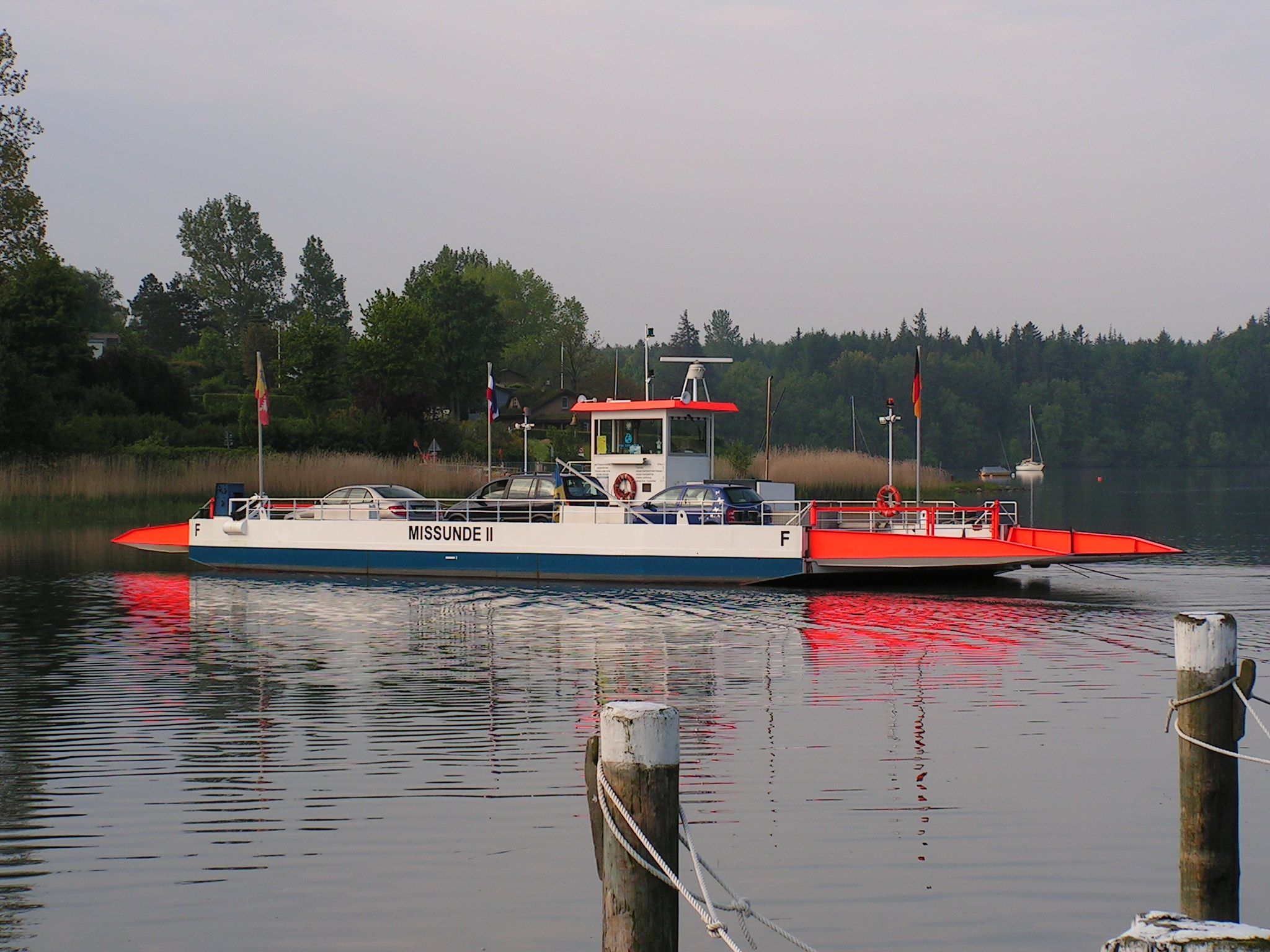 Missunde/Kettenfähre über die Schlei